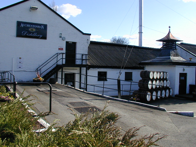 Auchentoshan distillery